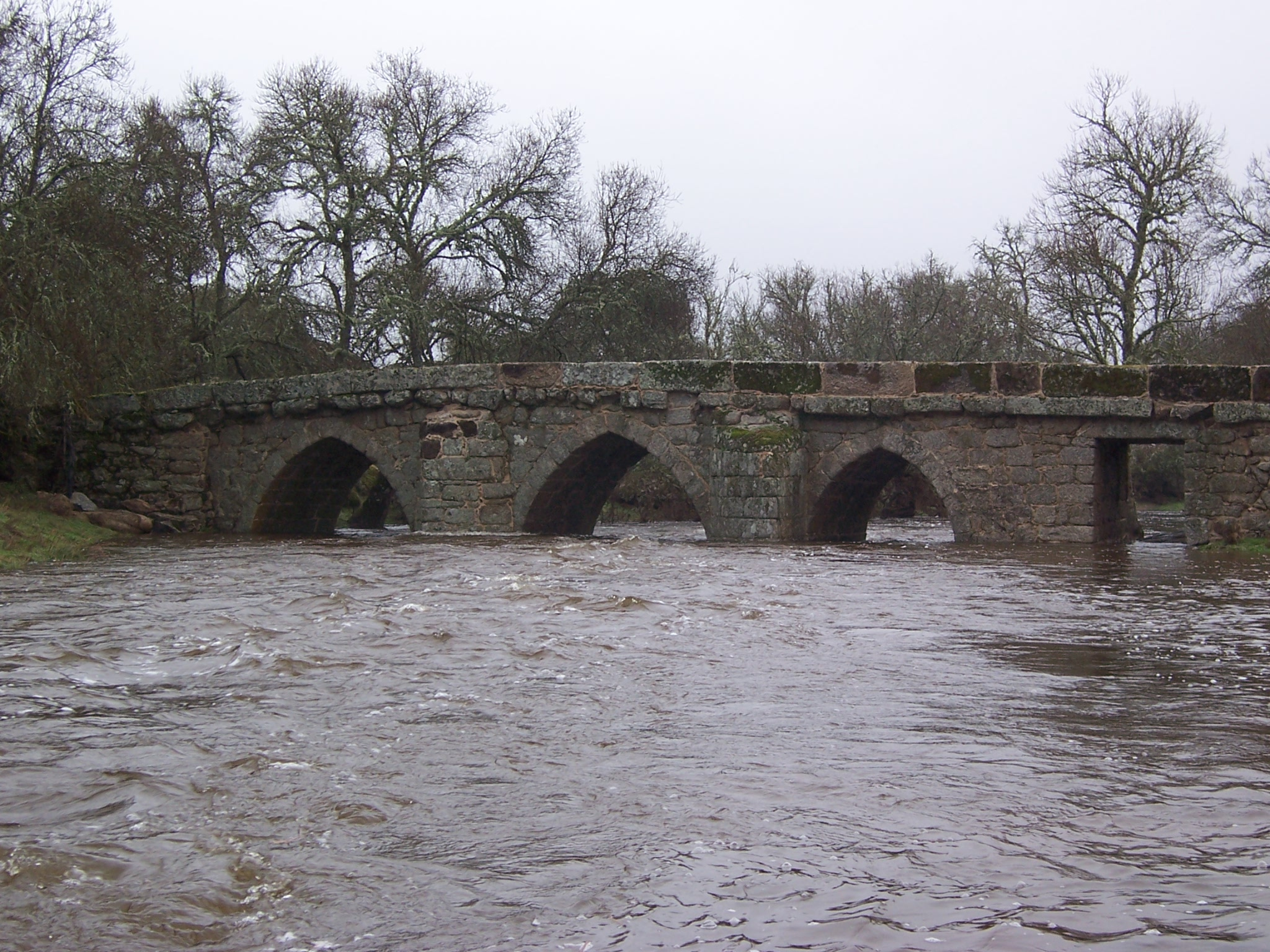 Puente de La Albañeza, en Arcillo, en la Rivera de Fadoncino.